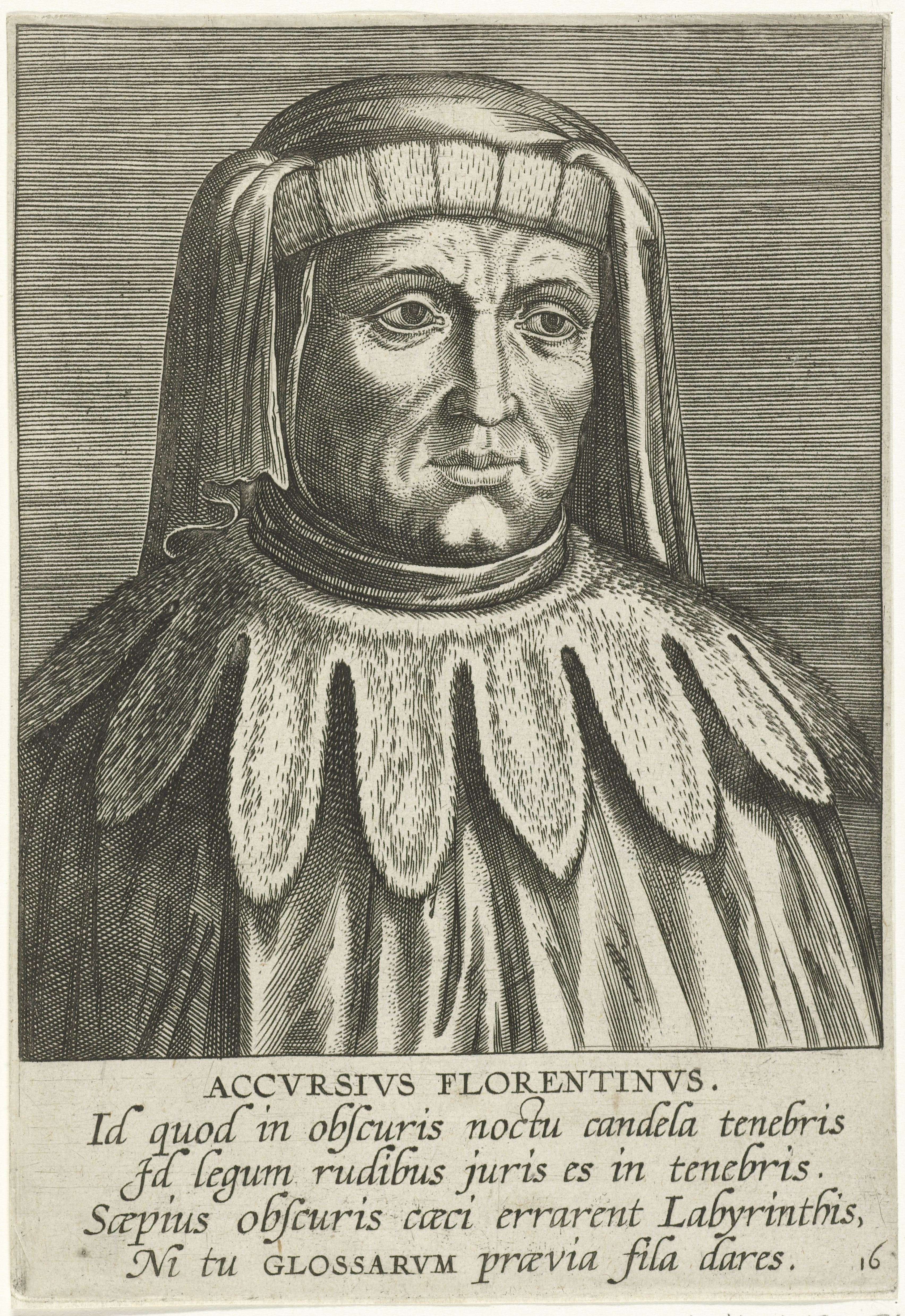 IdentificatieTitel(s): Portret van AccursiusAccvrsivs Florentinvs (titel op object)Portretten van beroemde geleerden (serietitel)Imagines L. Doctorum Virorum (serietitel)Objecttype: prent Serienummer: 16/50Objectnummer: RP-P-1909-1061Catalogusreferentie: New Hollstein Dutch 583Opschriften / Merken: verzamelaarsmerk, verso rechtsonder, gestempeld: Lugt 2228Omschrijving: Portret van Accursius van Firenze, een beroemde glossator uit de middeleeuwen. Buste naar rechts. De prent heeft een Latijns onderschrift en maakt deel uit van een serie van beroemde geleerden.VervaardigingVervaardiger: prentmaker: Philips Gallenaar prent van: Enea Vicoschrijver: Franciscus Raphelengius (I)uitgever: Philips Galle (mogelijk)uitgever: Theodoor Galle (mogelijk)Plaats vervaardiging: prentmaker: Antwerpennaar prent van: Ferrara (stad)schrijver: Antwerpenuitgever: Antwerpenuitgever: AntwerpenDatering: 1587 - 1606Fysieke kenmerken: gravureMateriaal: papier Techniek: graveren (drukprocedé)Afmetingen: blad: h 169 mm × b 117 mmOnderwerpWie: AccursiusVerwerving en rechtenVerwerving: aankoop 1909Copyright: Publiek domein